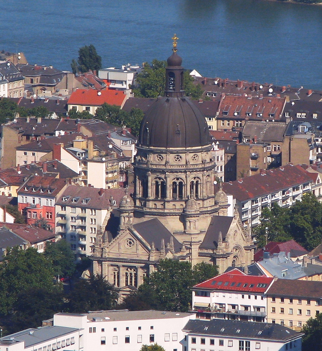 Mainz Luftbild Christuskirche zu Mainz auf der Kaiserstraße Foto 2008 Wolfgang Pehlemann Wiesbaden IMG_0077